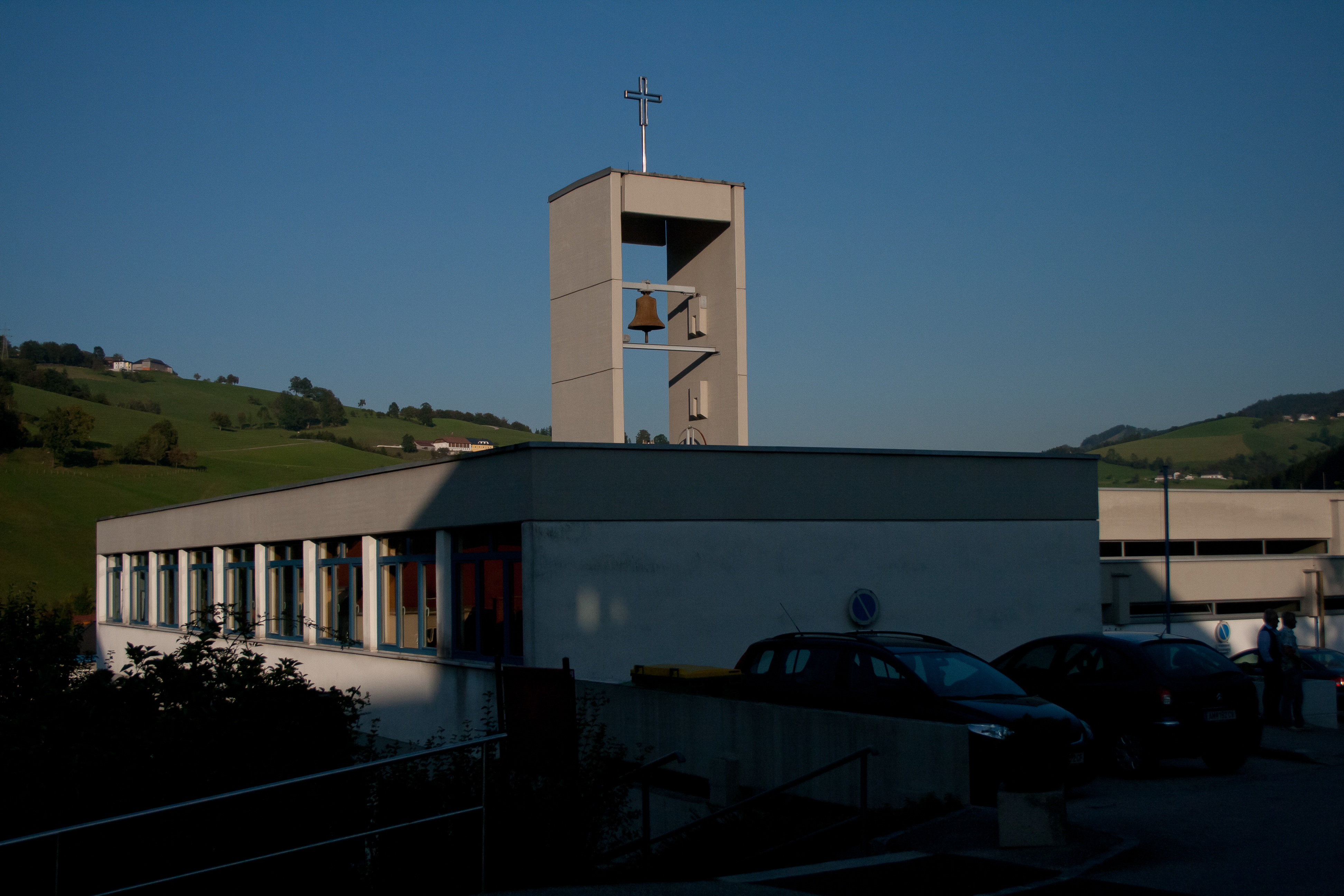 Kath. Pfarrkirche Hl. Familie